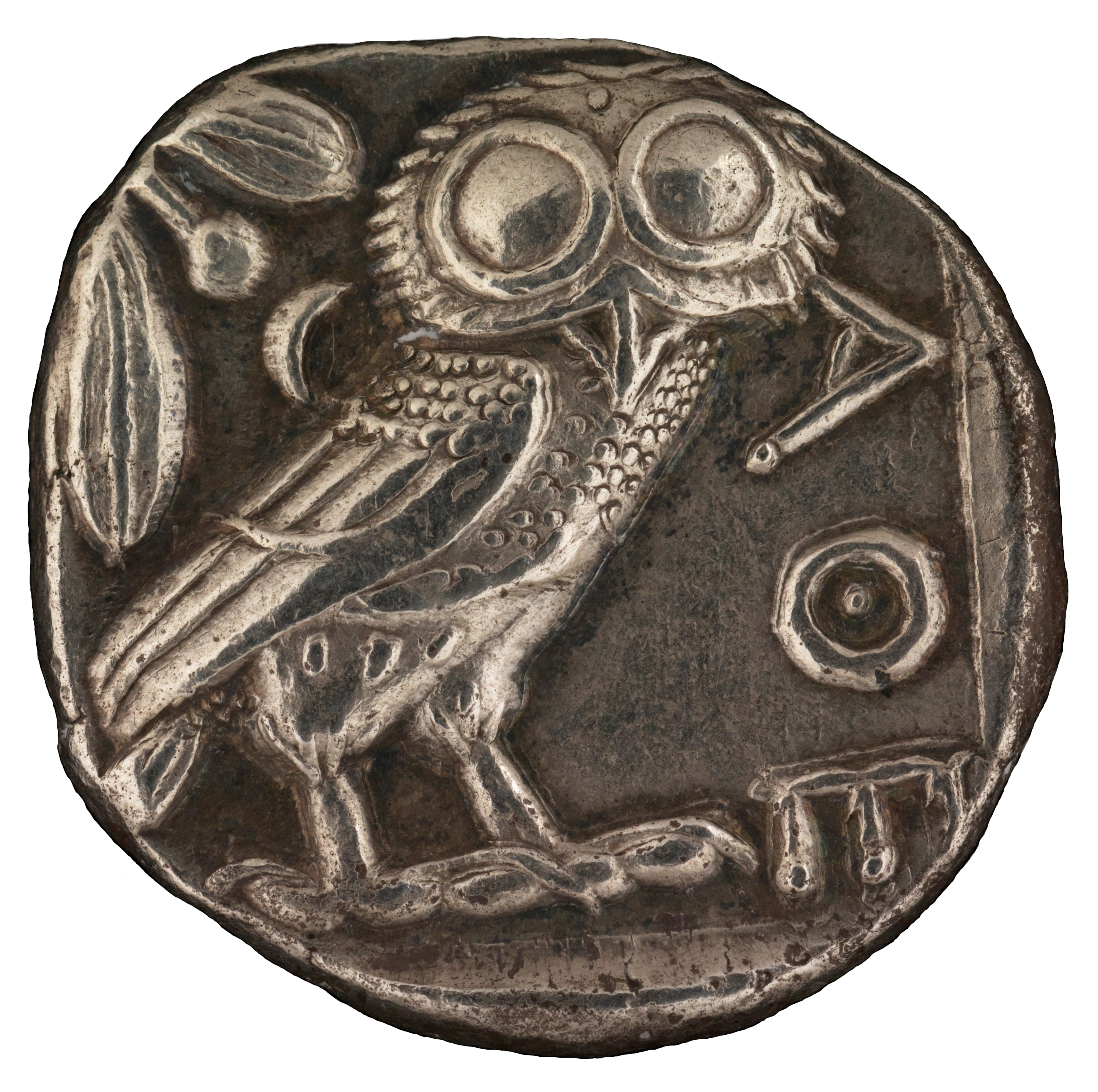 Monnaie athénienne, tétradrachme d'argent, -450 av. J.C. Conservé par la Fondation Martin Bodmer.